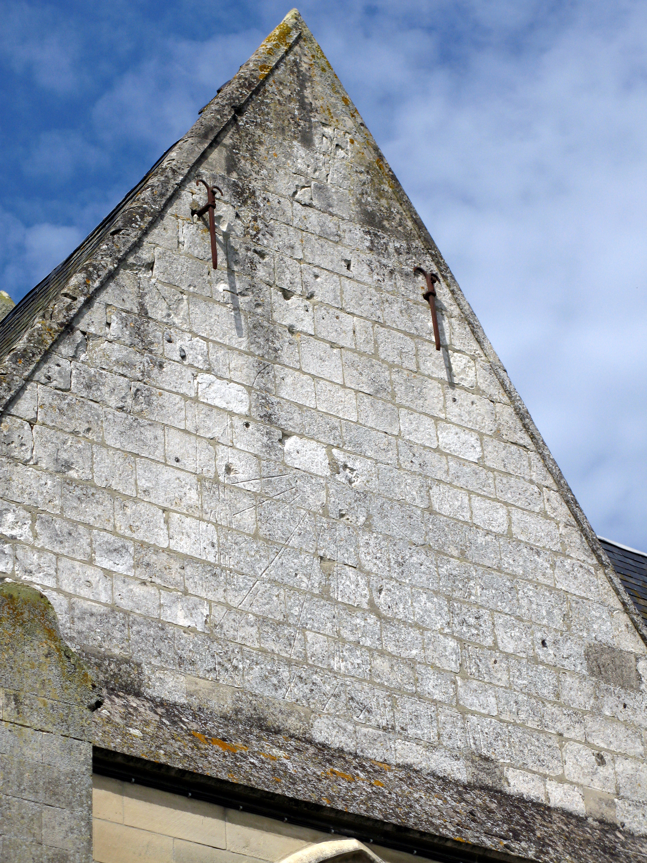 Ailly-le-Haut-Clocher (Somme, France) - Sur la face Sud de l'église, on aperçoit encore un peu les traces du cadran solaire.